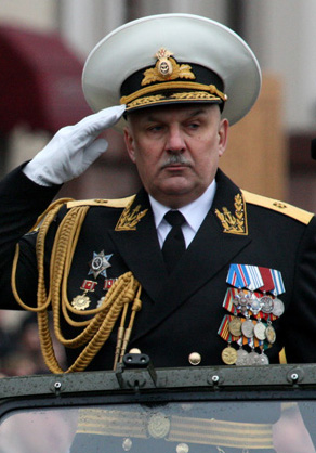 Командующий Тихоокеанским флотом адмирал Авакянц Сергей Иосифович